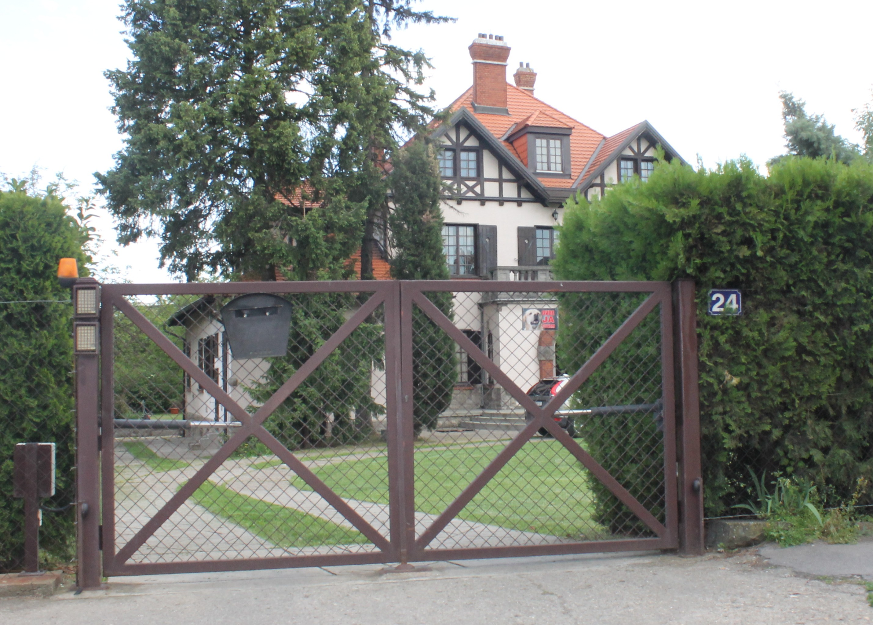 Filmska kuća, poznata kao Katinkina kuća, u naselju Dedinje u Beogradu, poznata po velikom broju snimljenih filmova i Tv serija poput filmova - Poseban tretman, Dezerter, Bal na vodi, Žikina dinastija i Tv serija - Gore dole, Bolji život, Srećni ljudi, Jelena i dr.